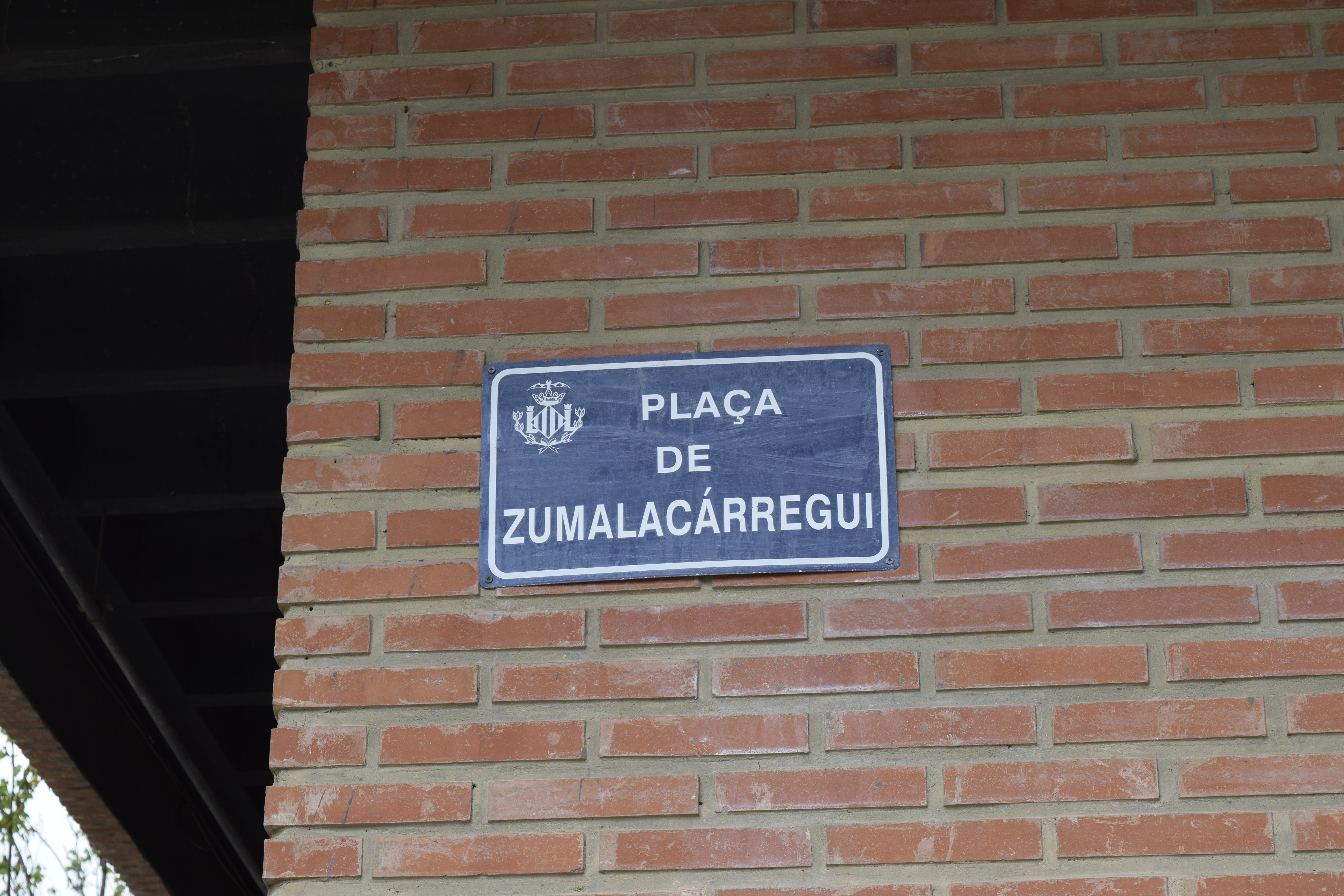 Plaza de Zumalacárregui en Valencia